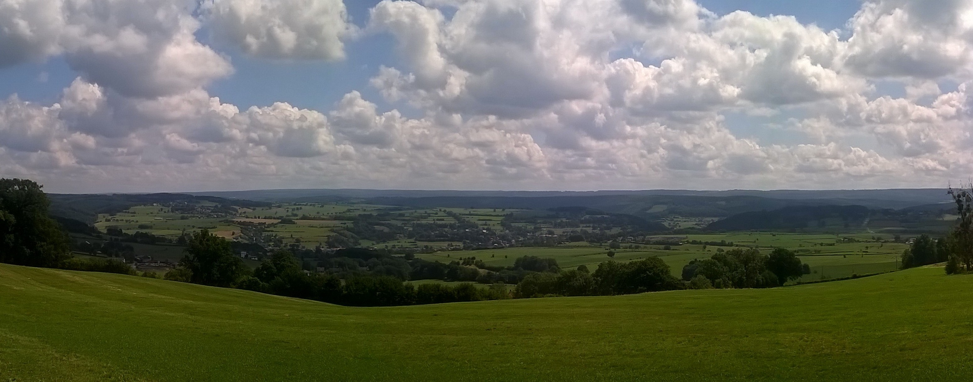 A Theux comme partout ailleurs, différentes couches de sédiments amenées par la mer se sont déposées au fur et à mesure des périodes géologiques. Des couches calcaires ont été recouvertes par d’autres couches argileuses. Phénomène géologique unique en Wallonie, des glissements de terrain ont provoqué une érosion exceptionnelle localisée à Theux, qui a mis en exergue les anciennes couches de calcaire.